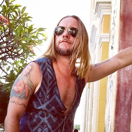 foto Júnior Cordeiro